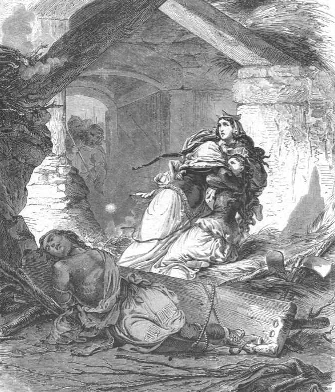 Smrt Chramna, Paul Lehugeur